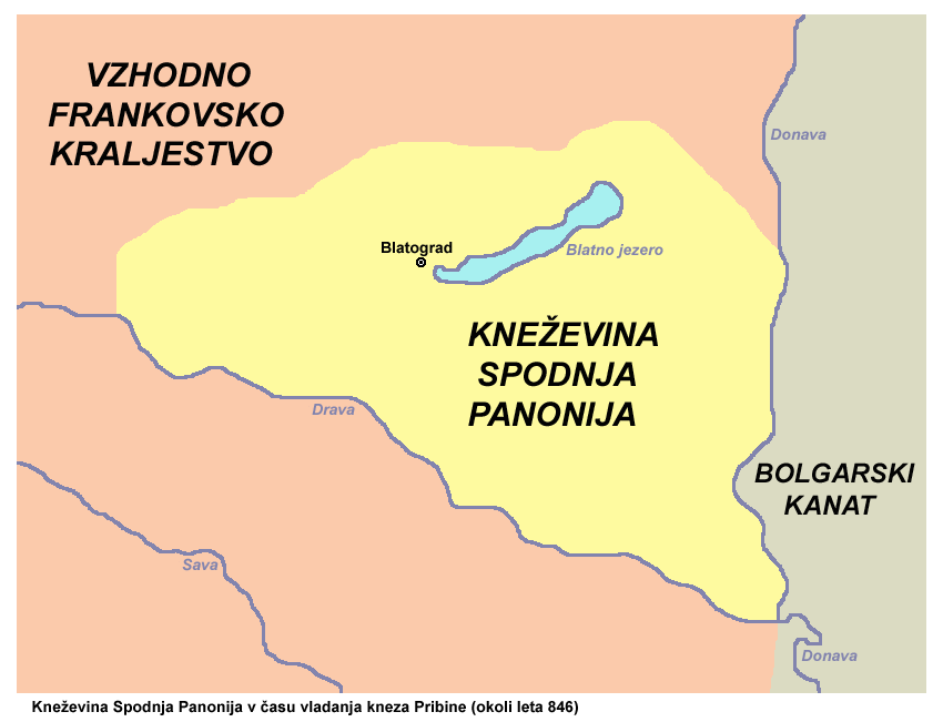 Principality of Lower Pannonia - one of the earliest Slavic states. Księstwo Błatneńskie - jedno z pierwszych państw słowiańskich.